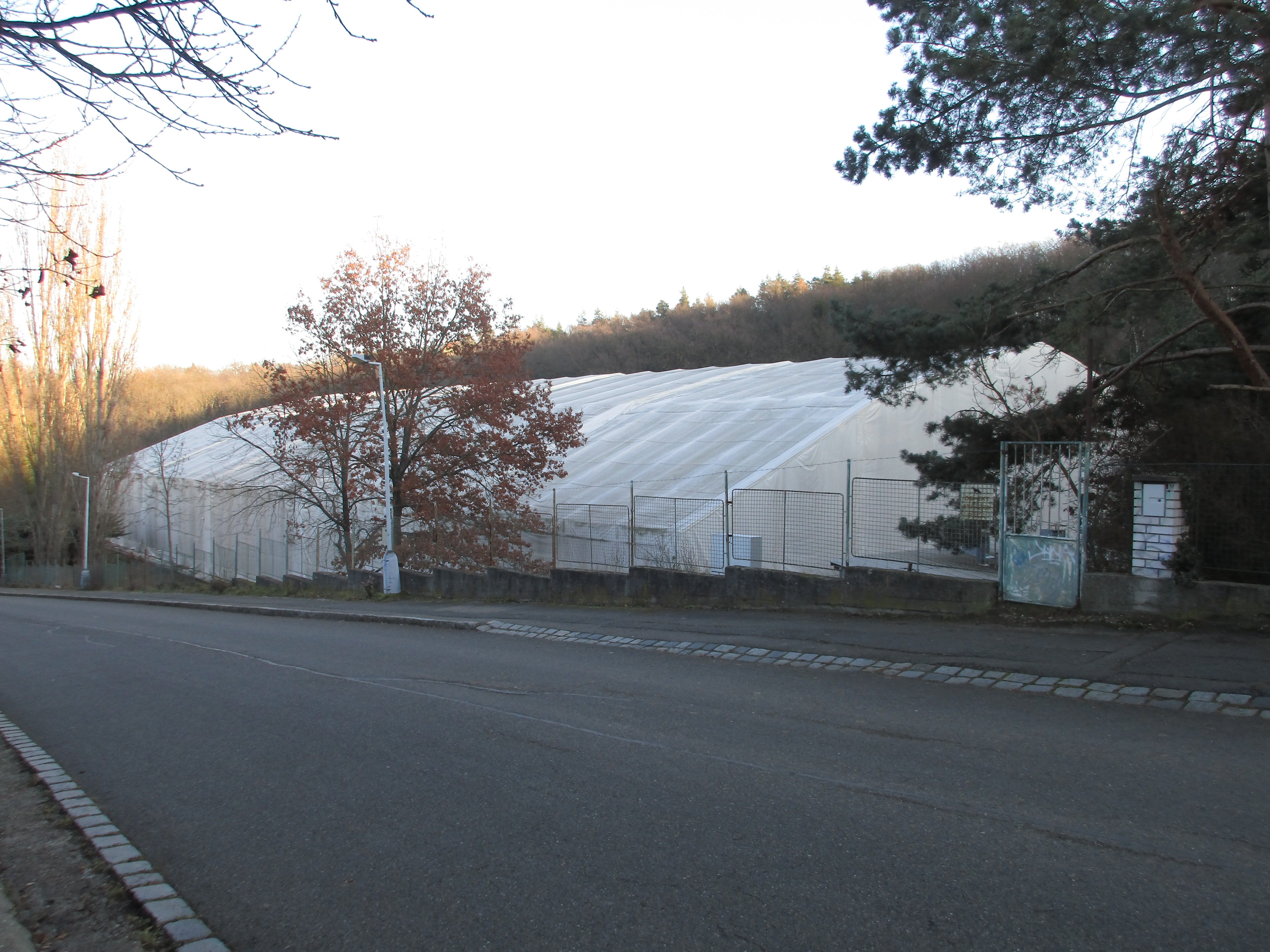 Velodrom Motol, Nad Hliníkem 1186/4, Praha 5-Košíře.